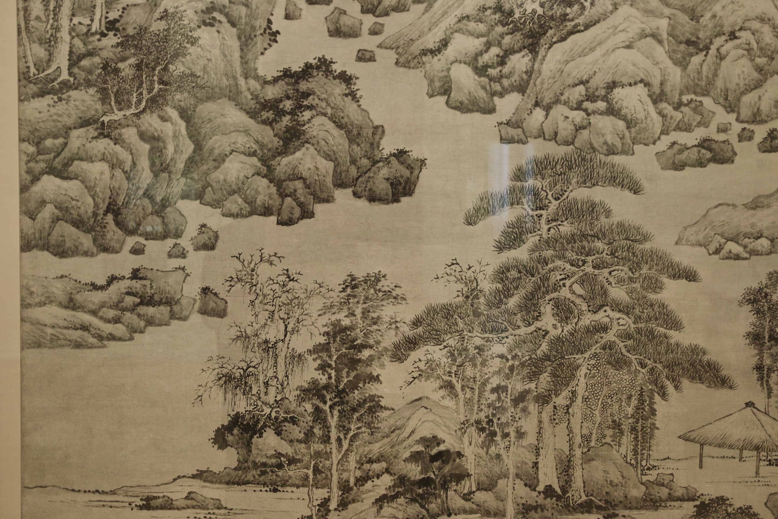 Gemälde von Huang Ding, chinesischer Maler der Qing Zeit. Museum für Kunst und Gewerbe, Hamburg. Detail